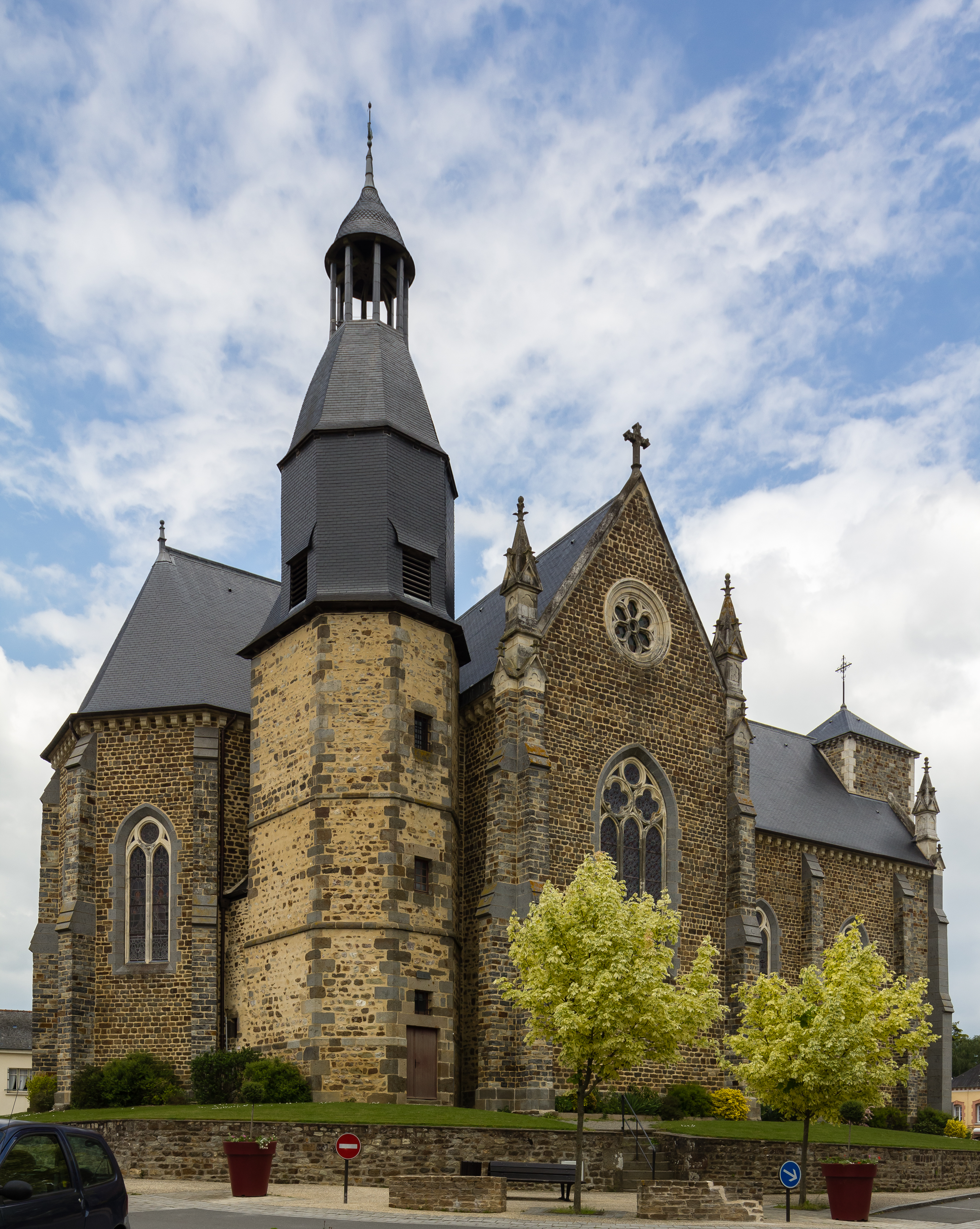 Tour de l'église Saint-Martin de La Mézière (France).